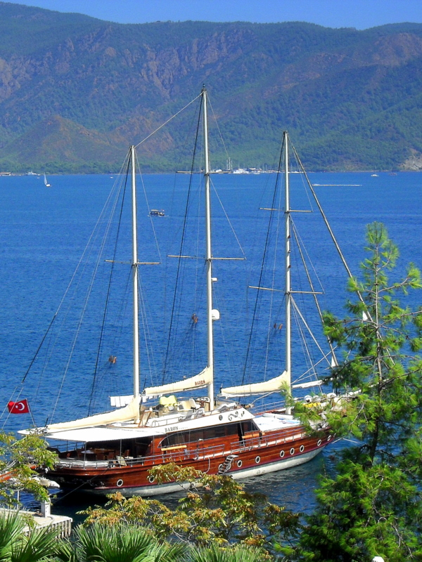 Marmaris, żaglowiec - 25 IX 2011 r.